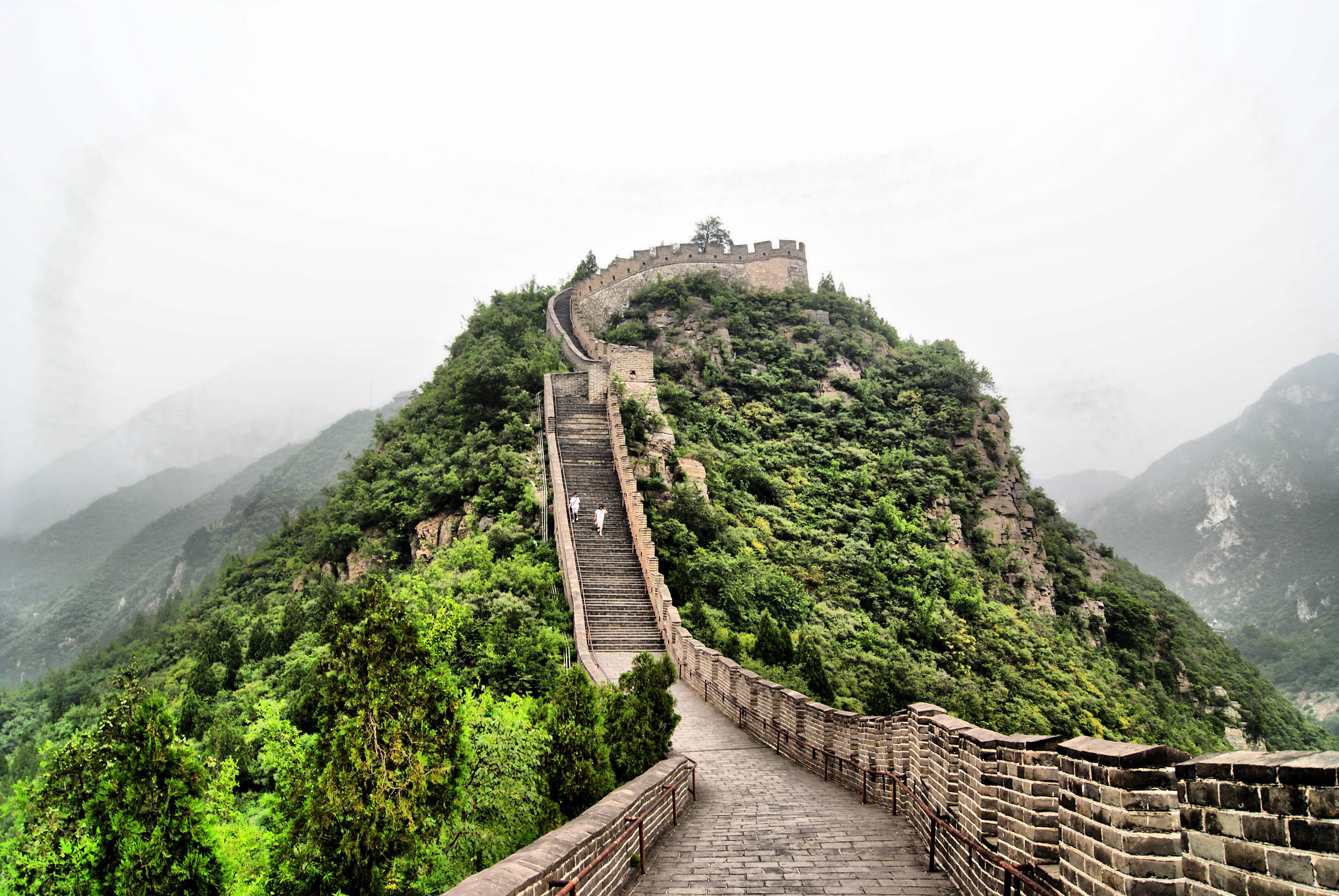 Great wall-Badaling-Beijing-China